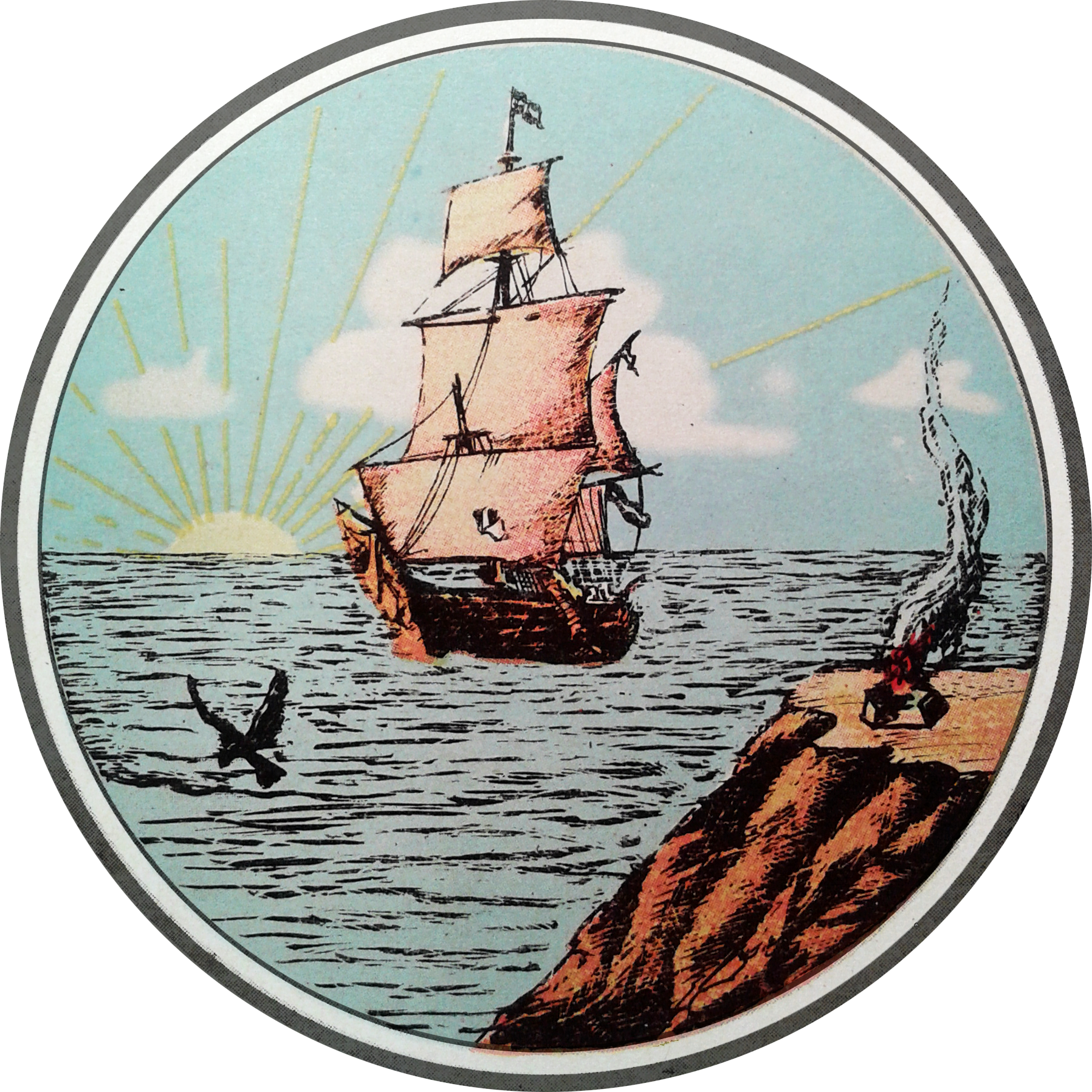 Escudo diseñado por el arquitecto Juan José Chiogna en 1914.